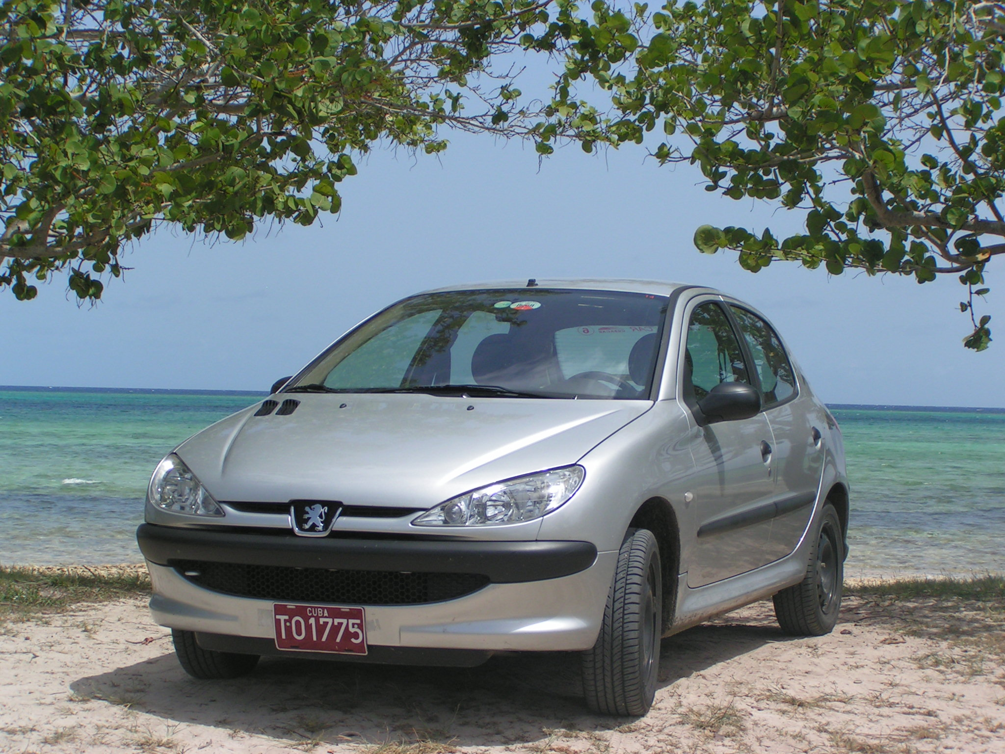 Peugeot 206 auf Kuba bei Banes (2004), selbstfotografiert Peugeot 206 in Cuba near Banes (2004), photo taken by me